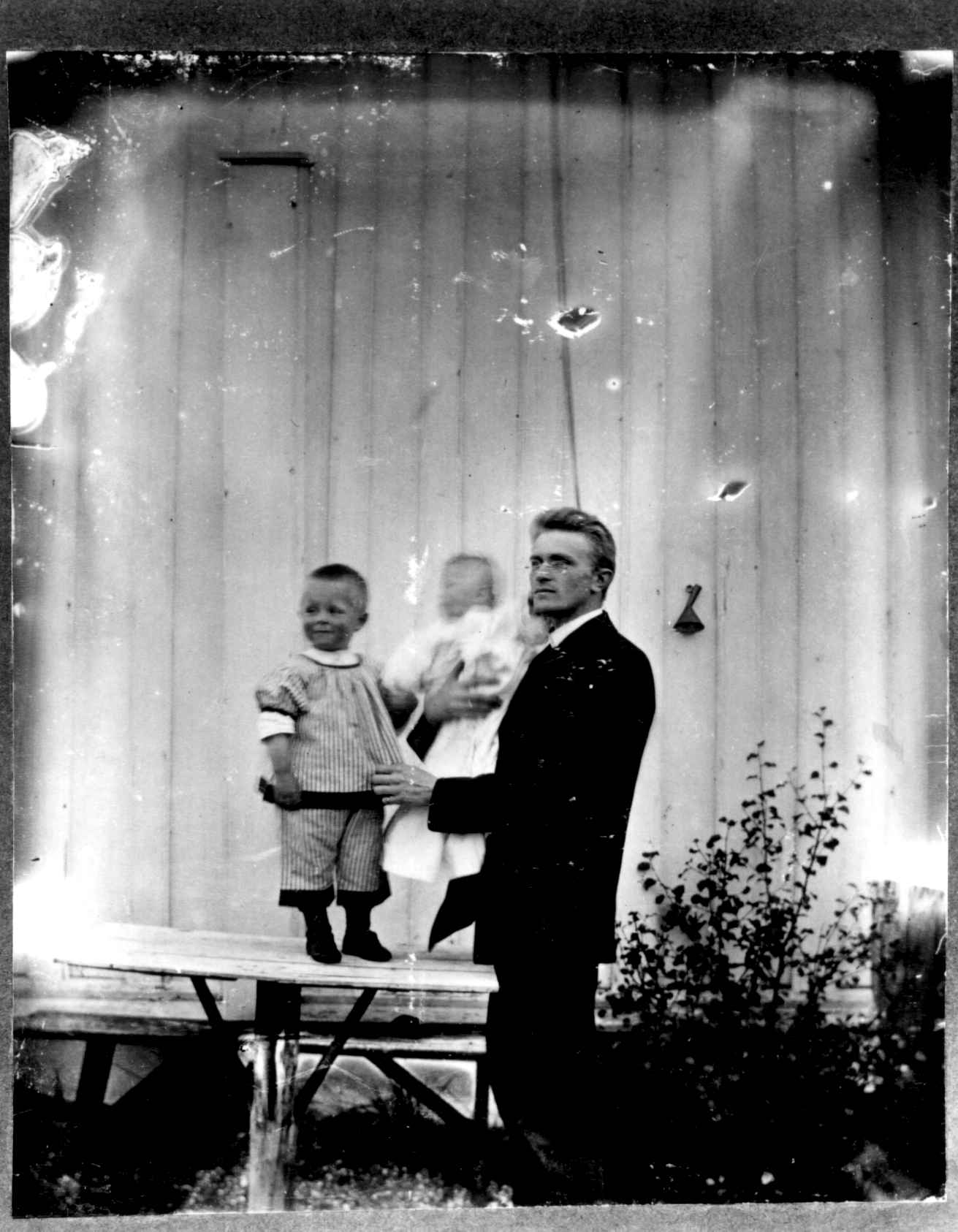 Pastor Jens Otterbech med barna Haakon, f.1895 og Werner f.1897. Bildet er antakelig tatt utenfor Kistrand kirke på Werners dåpsdag i juli 1897.